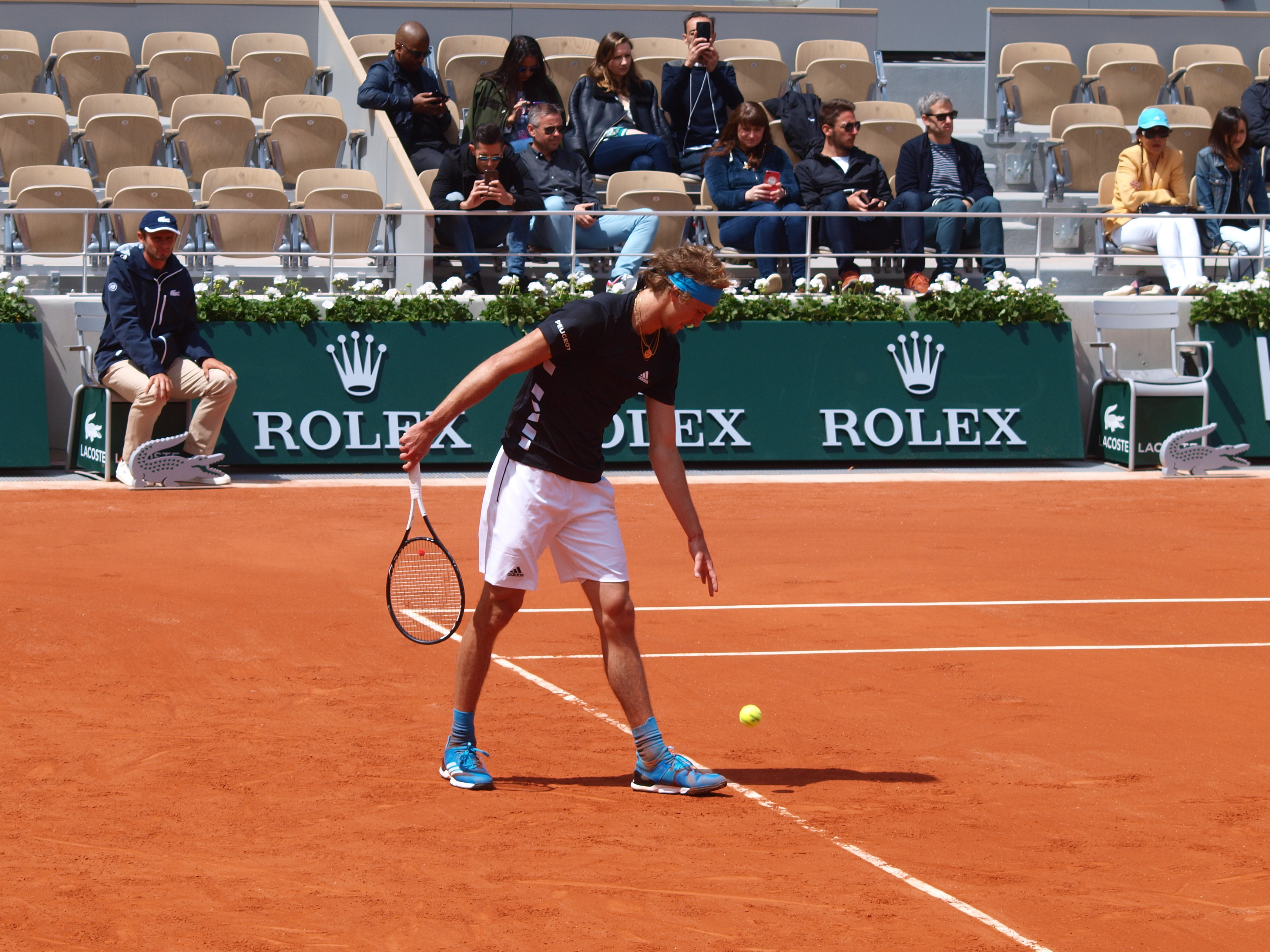 Alexander Zverev, sur le court Chatrier du stade Roland Garros, le 28 mai 2019